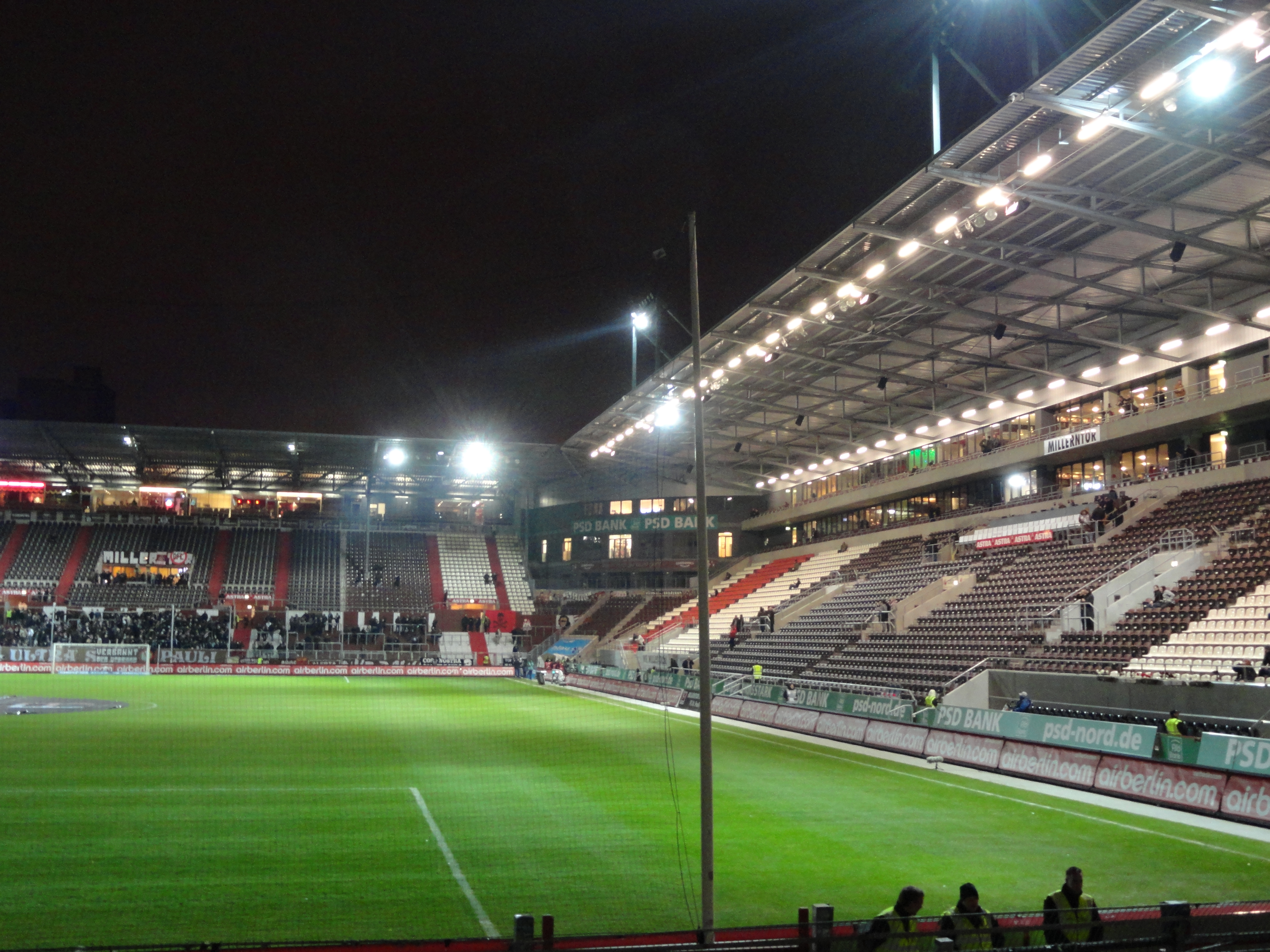 Das Millerntor-Stadion nach Umbau von Südkurve und Haupttribüne (2012)